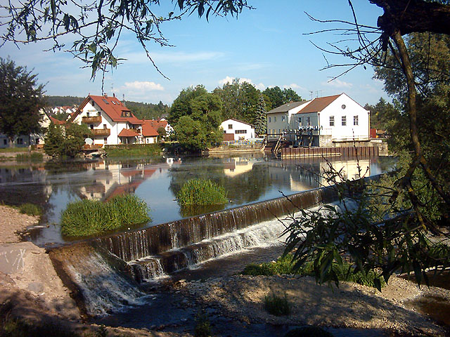 Schwarzenfeld (Oberpfalz): Das Naabwehr, im Hintergrund der Hammer - so genannt, weil dort lange Zeit ein vom Flusswasser angetriebener Eisenhammer sein Werk verrichtete